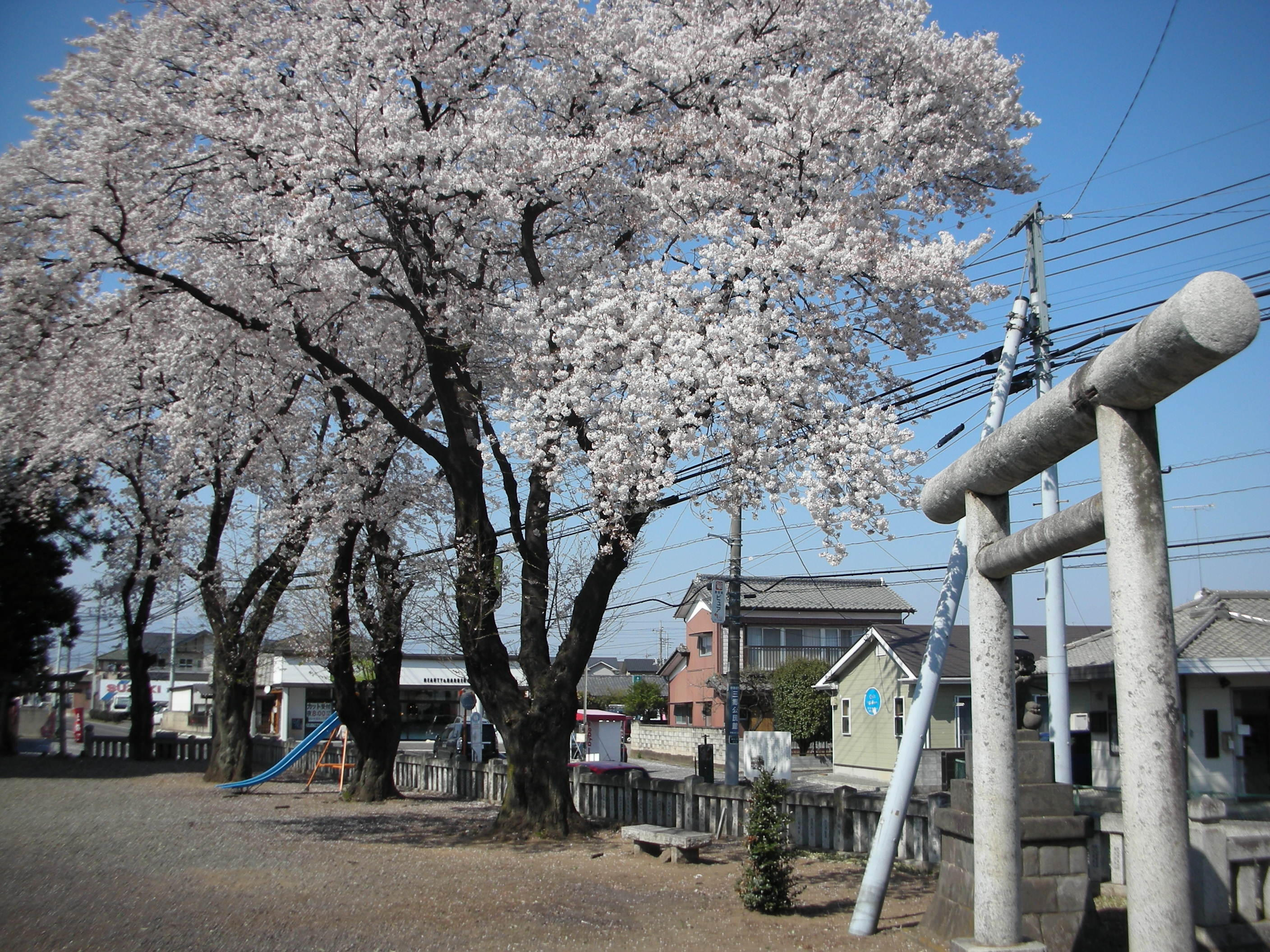 愛宕神社（群馬県伊勢崎市波志江町）の境内。